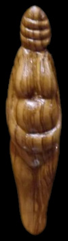 veneri di parabita riprodotte in legno d'ulivo presso mercatino salentino